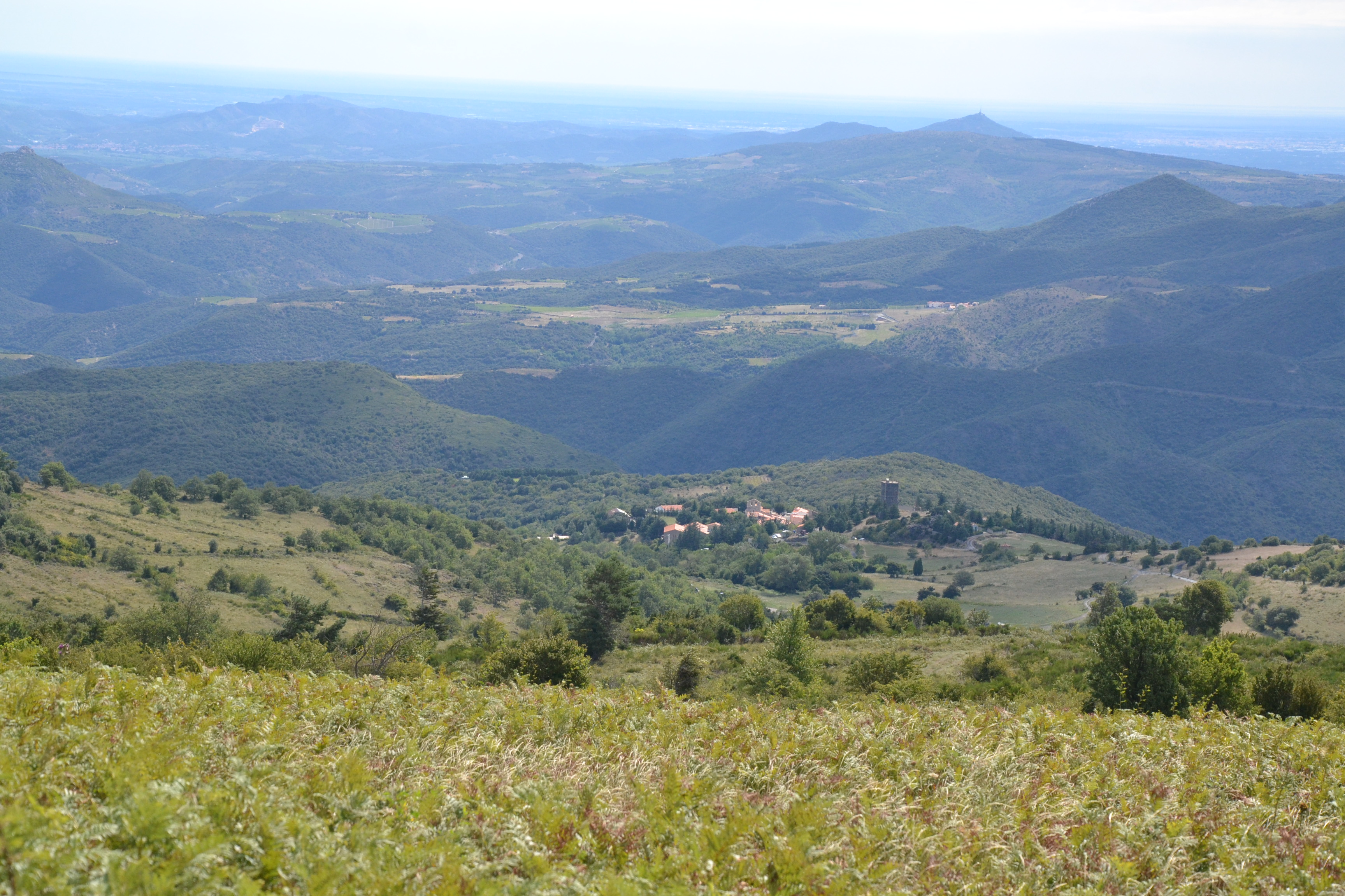 Paysage du Fenouillèdes depuis Prats-de-Sournia (Pyrénées-Orientales, France)